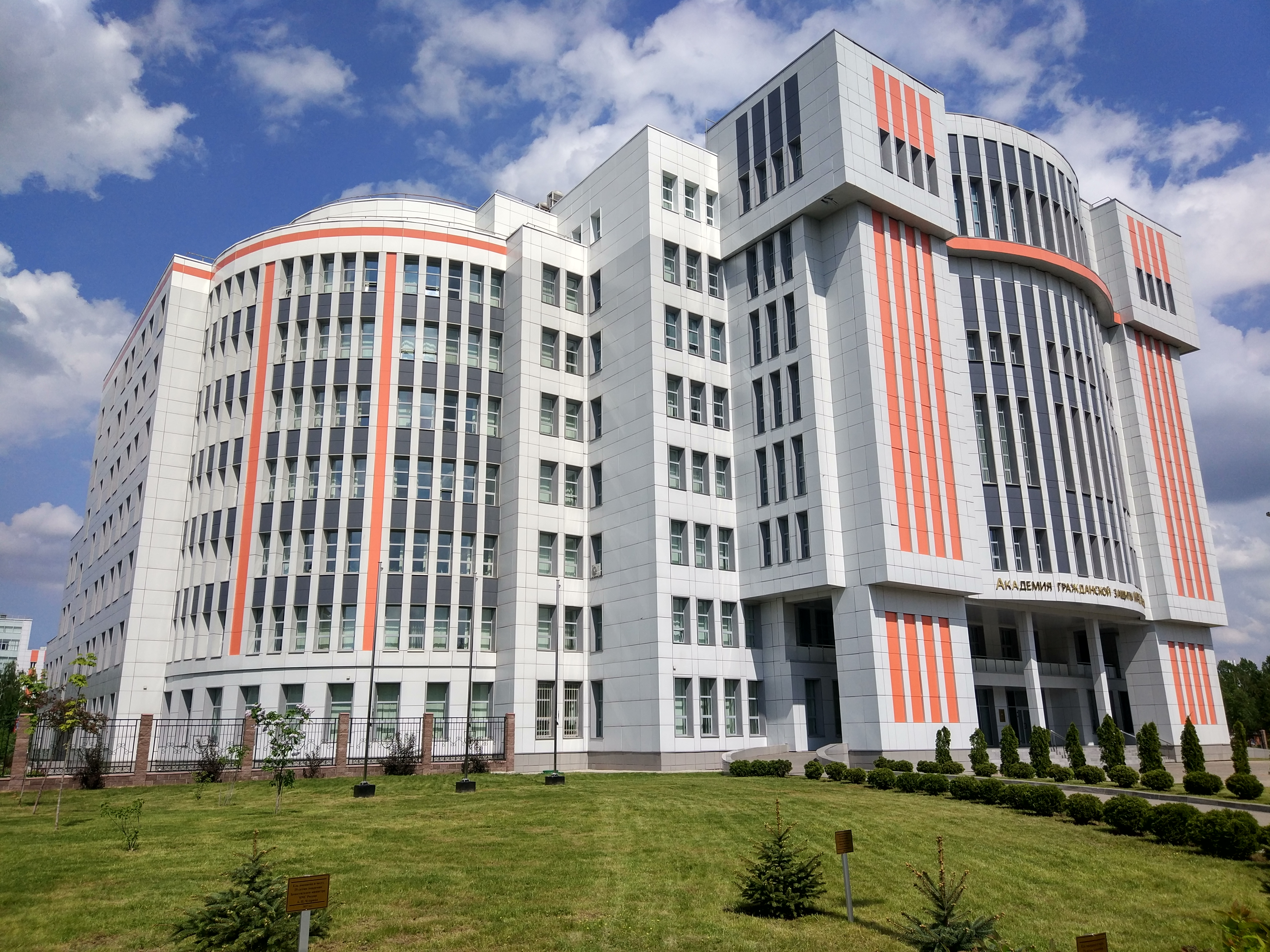 Главный ученый корпус Академии гражданской защиты МЧС России